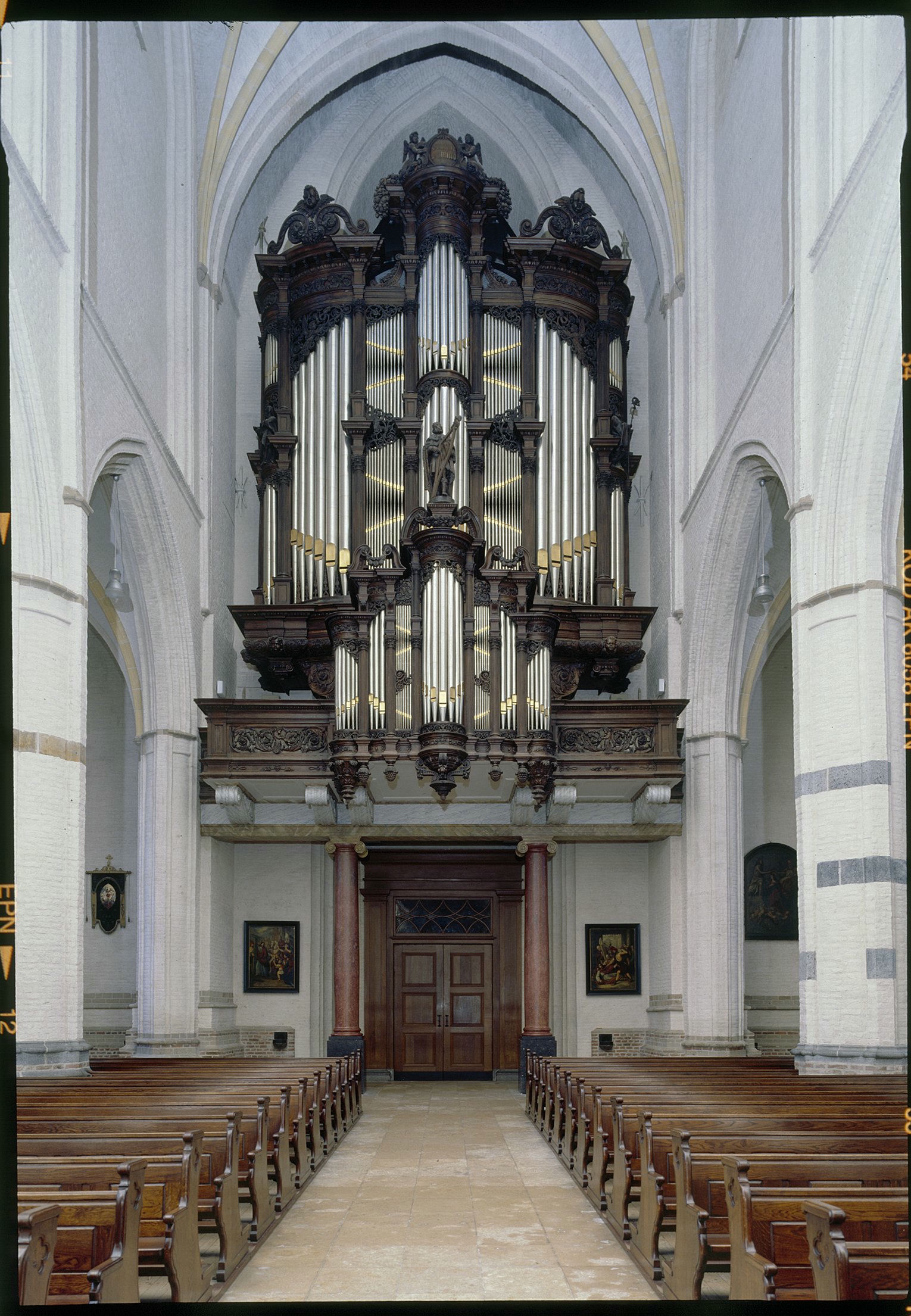 Sint Petruskerk: Interieur, aanzicht orgel, orgelnummer 1117 (opmerking: Gefotografeerd voor Het Historische Orgel in Nederland 1840-1849)